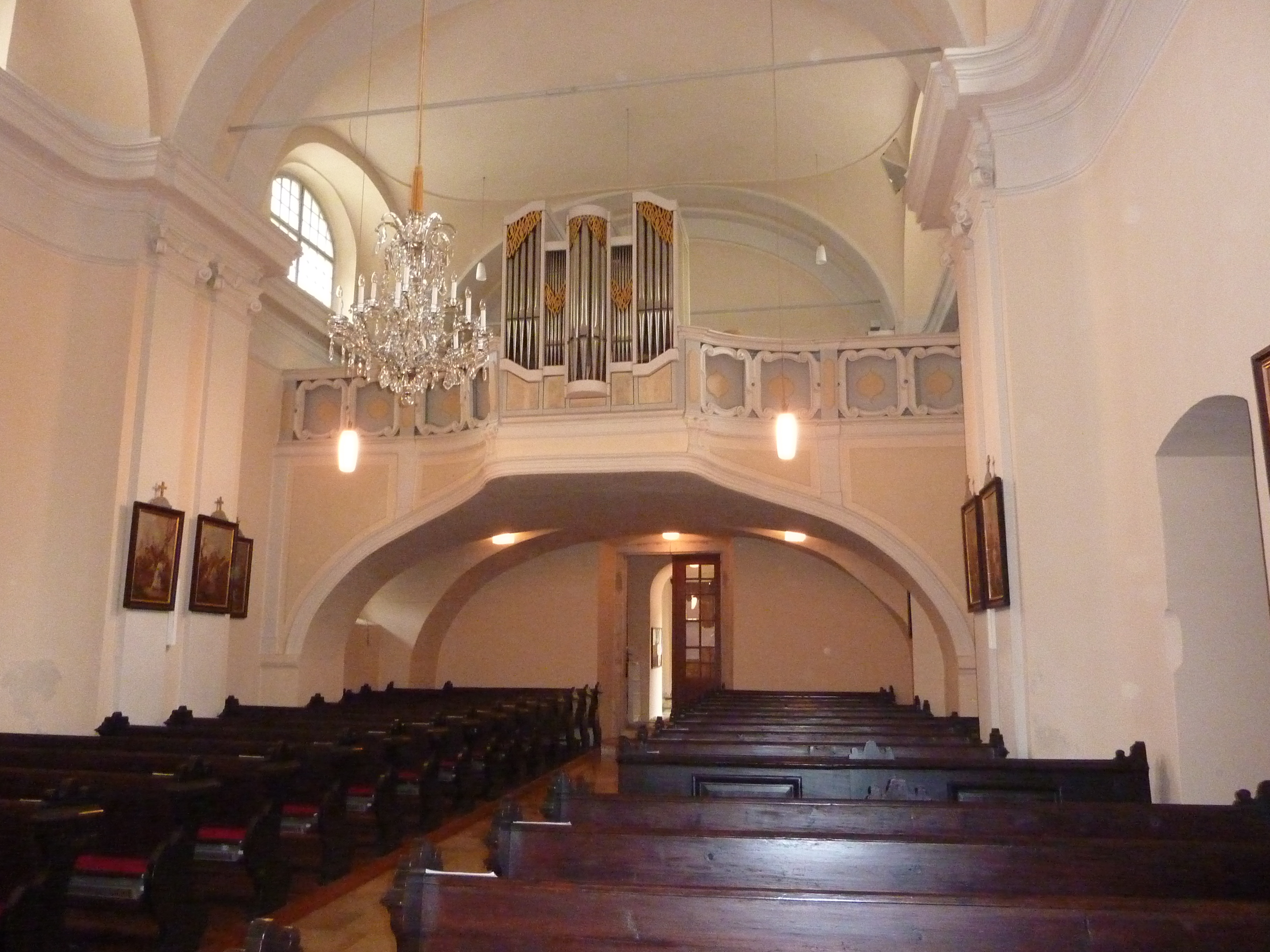 Pfarrkirche hl. Jakobus d. Ä., Etsdorf, Grafenegg, Niederösterreich - Empore mit Orgel (Gerhard Hradetzky, 1976)